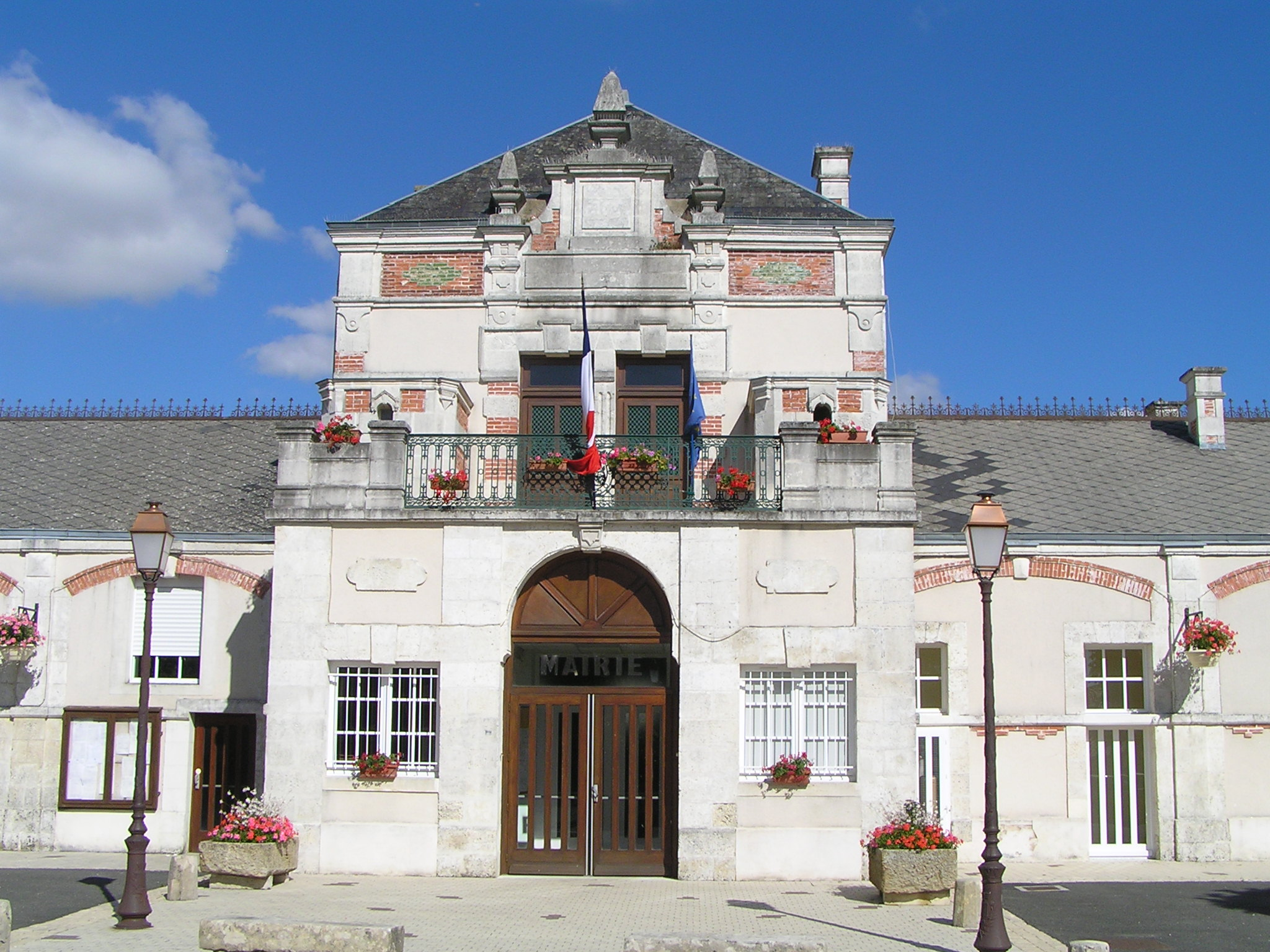 mairie de Paisay-Naudin-Embourie